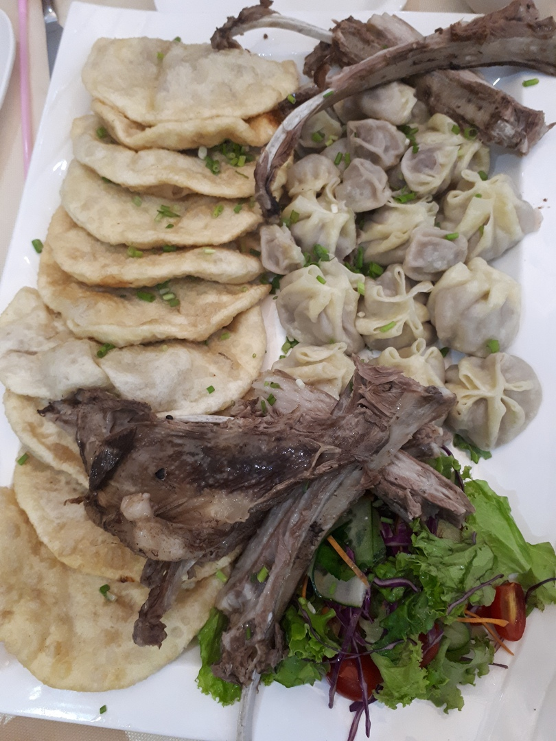 Dishes of Mongolian cuisine